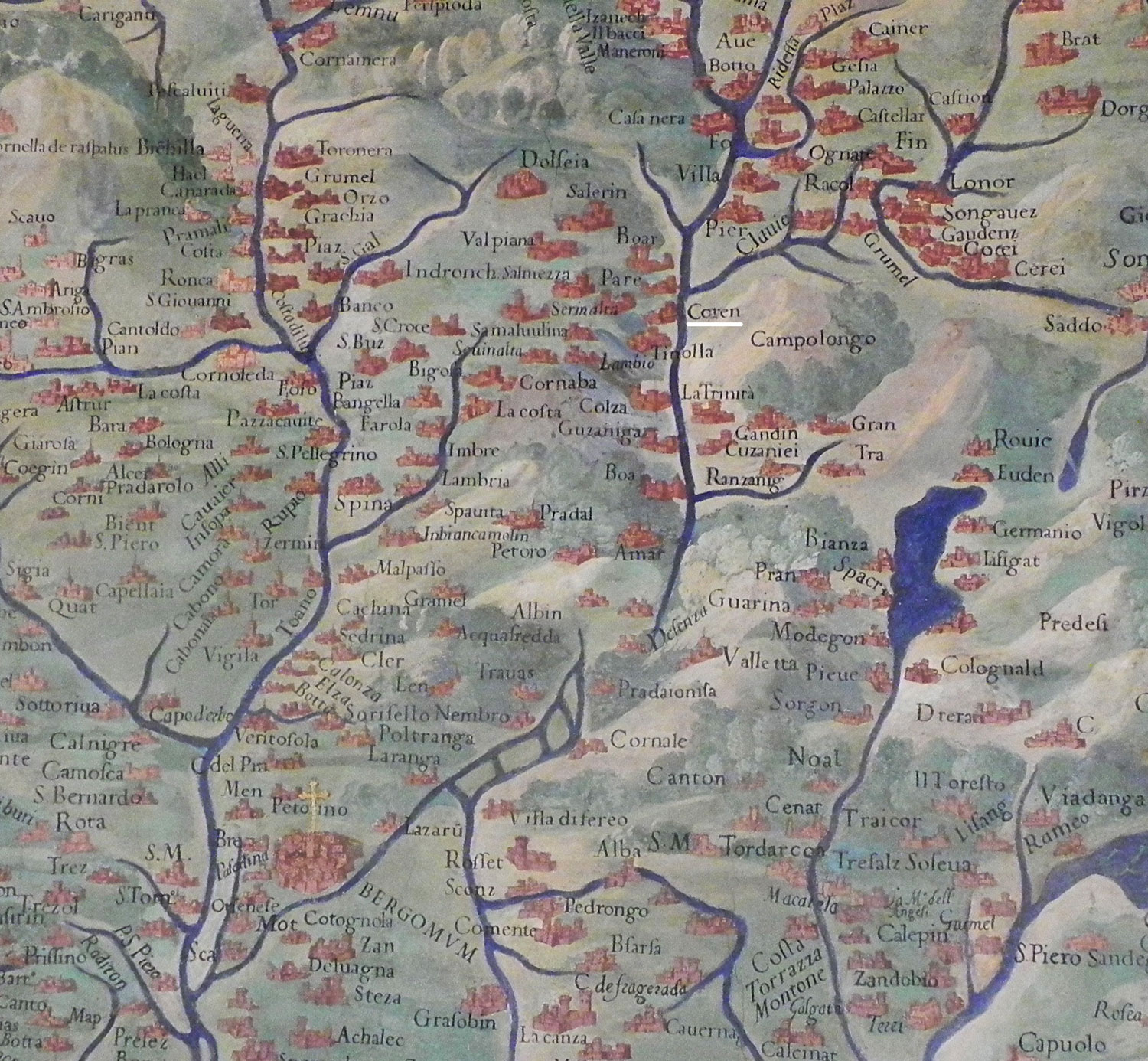 Mappa del 1580, conservata nel corridoio delle carte geografiche dei Musei Vaticani, in bianco sottolineato il paese di Gorno.